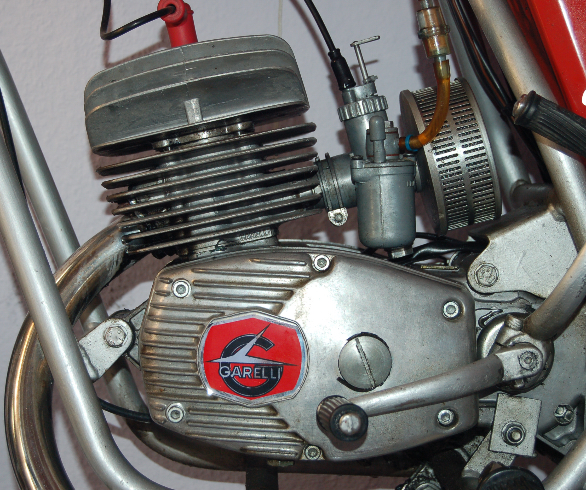 Garelli Rekord Motor, Baujahr 1973, 5-Gang Fußschaltung, 49 ccm und 9,5 PS.